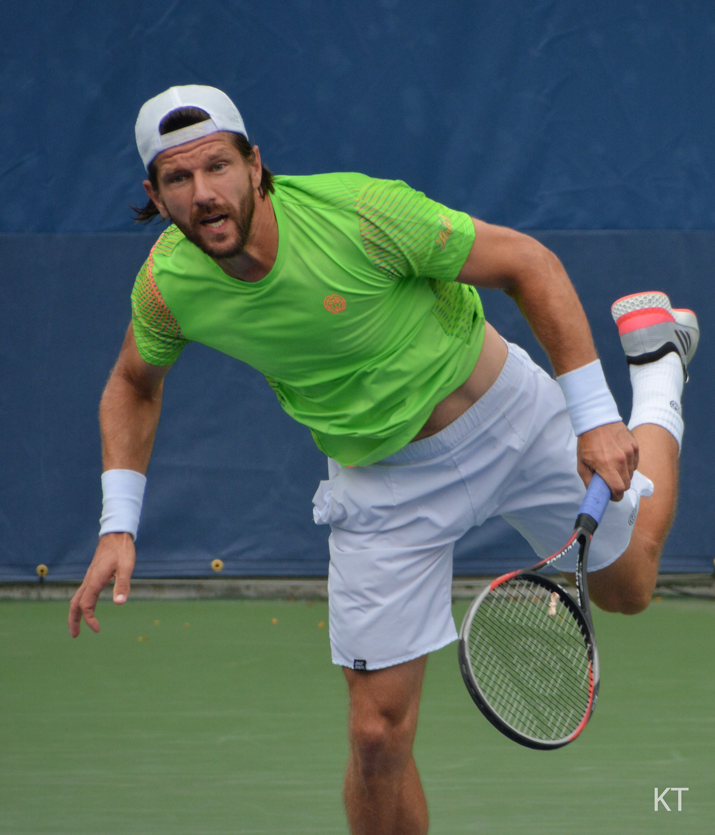 Nikola Mektic & Jurgen Melzer v Leo Mayer & Joao Sousa. Day 5 of US Open 2018.